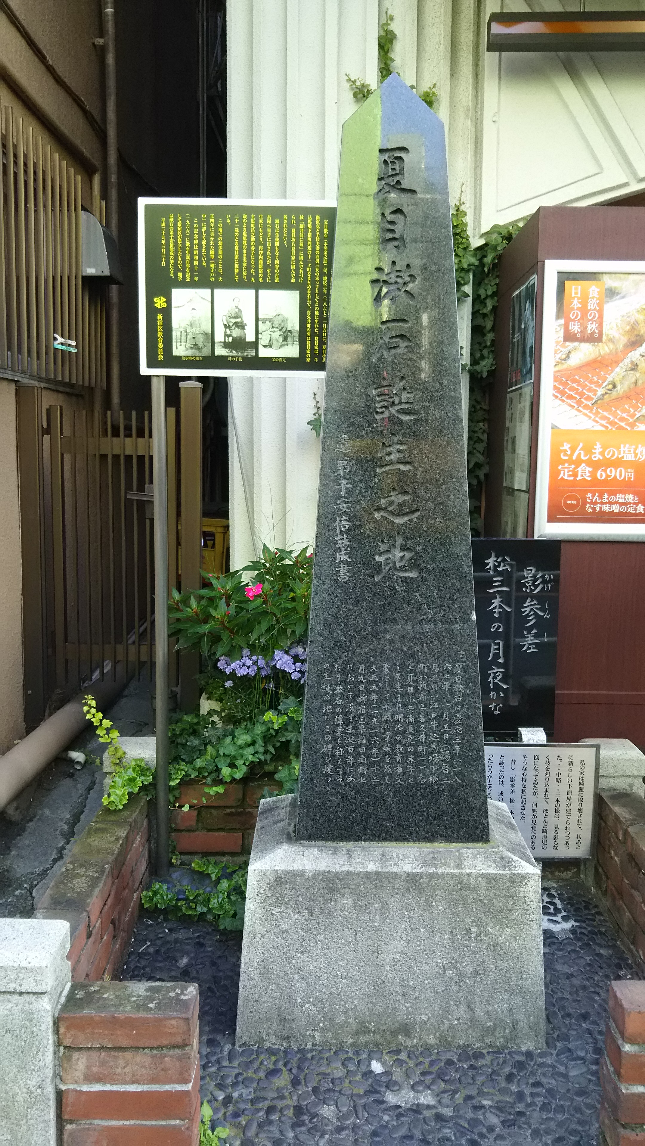 早稲田夏目坂